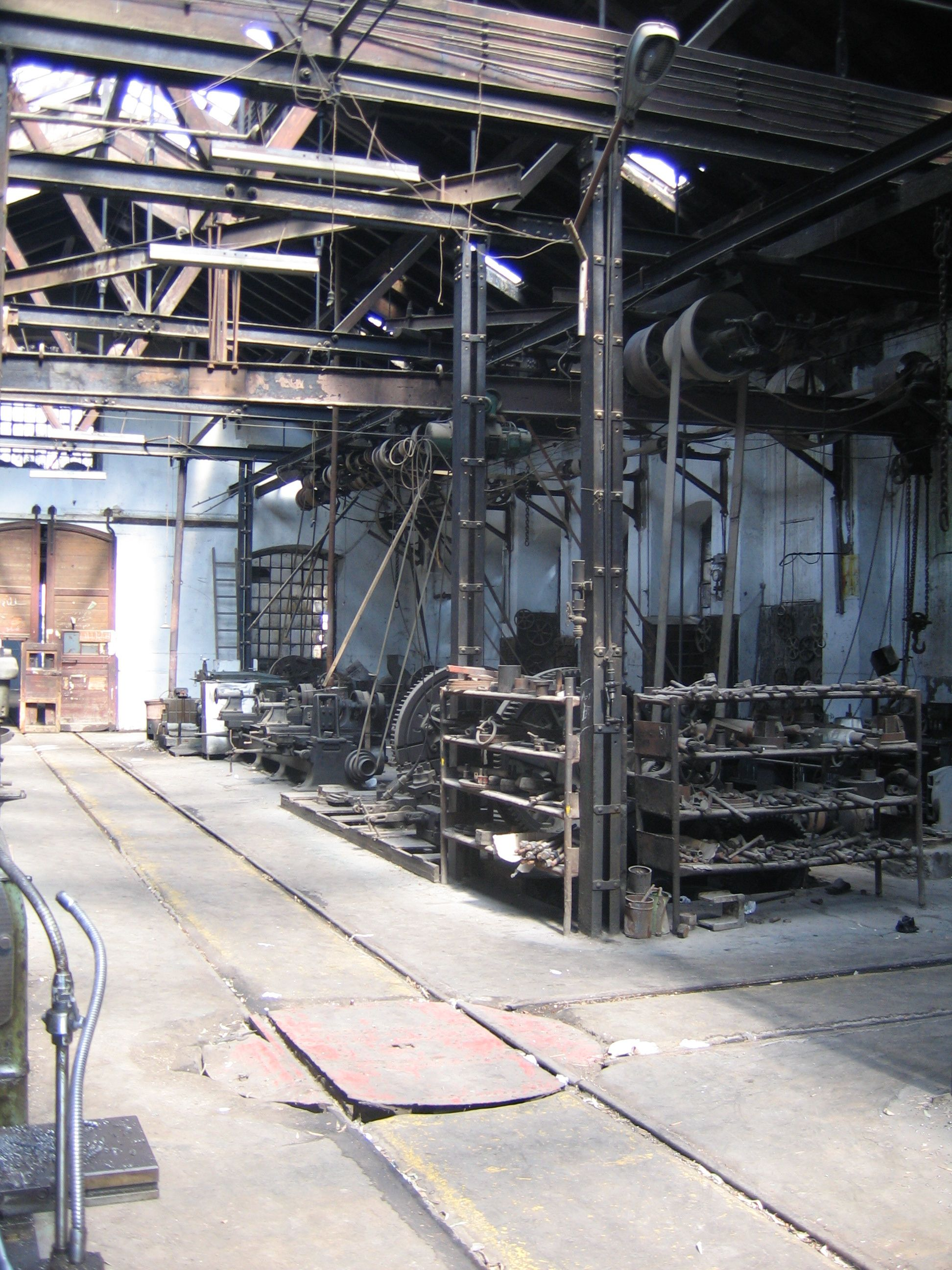 Ausbesserungswerk der Hedschasbahn in Damaskus-Kadam